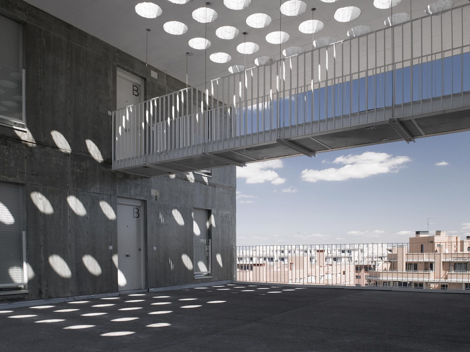 Edificio celosia 2